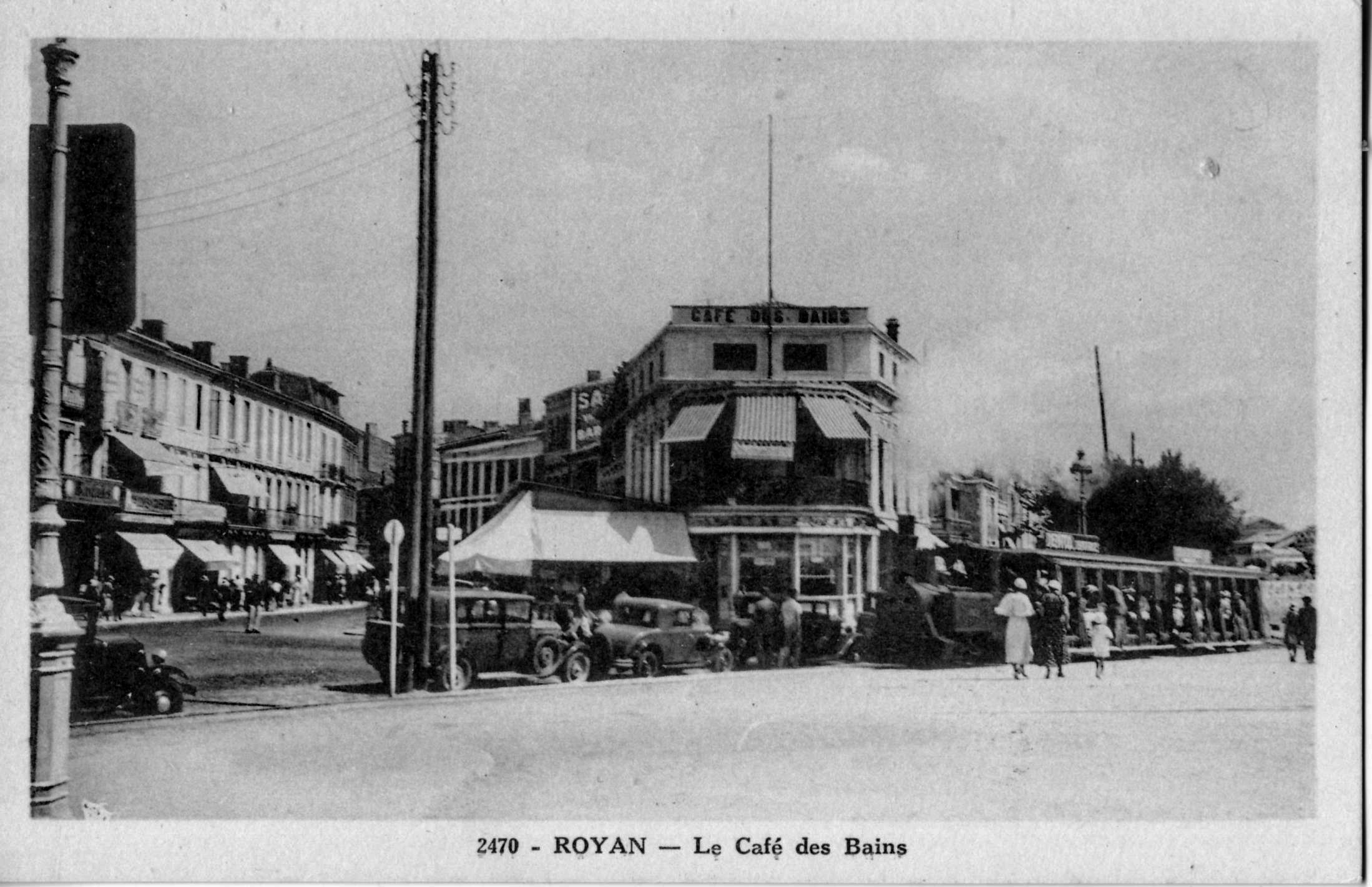 Carte postale ancienne éditée par Le Guiastrennec, n° 2470 : ROYAN - Le Café des Bains